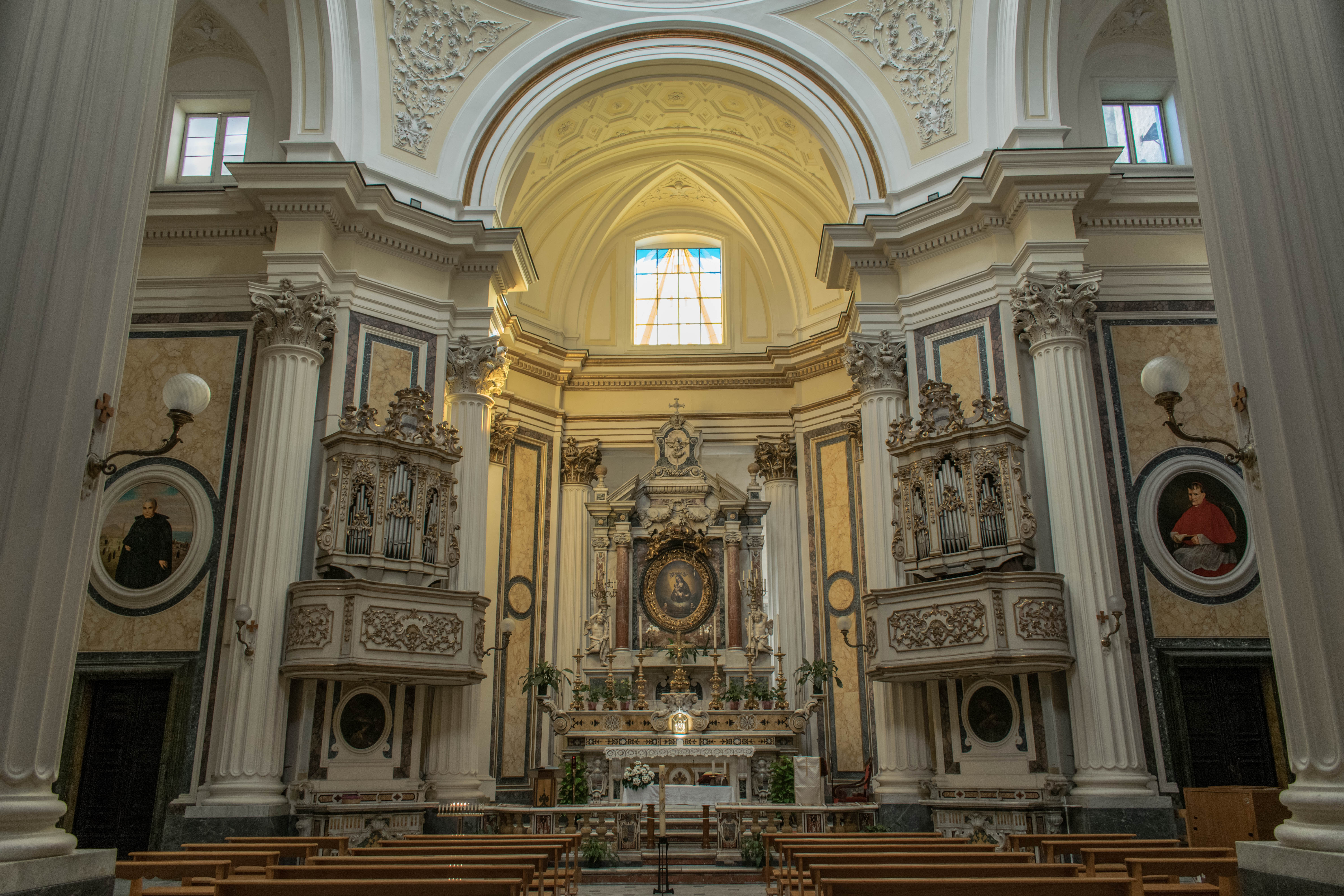 L'interno da centro, Santa Maria dell'Aiuto, Napoli